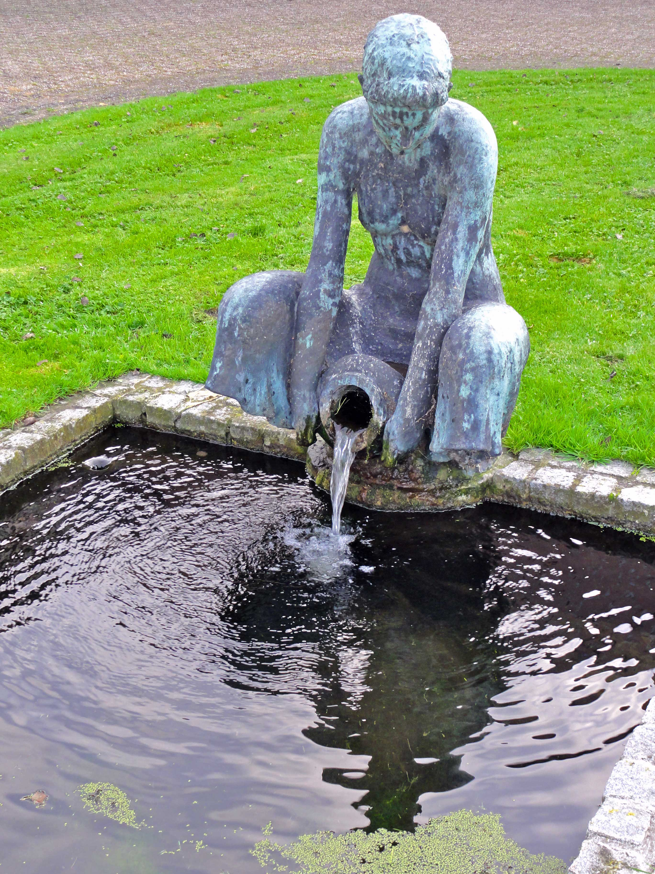 Sculptuur van een vrouwenfiguur met waterkruik bij het gebouw van het waterleidingbedrijf Dunea in Bergambacht